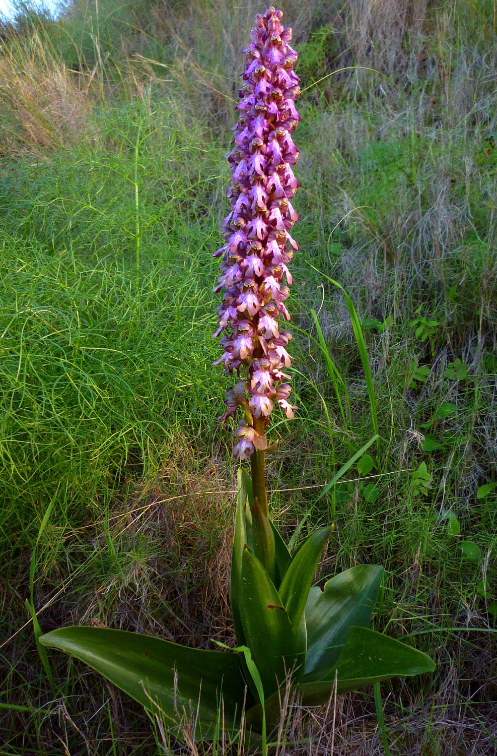 Barlia robertiana en el Puerto de la Cadena, Murcia, España.